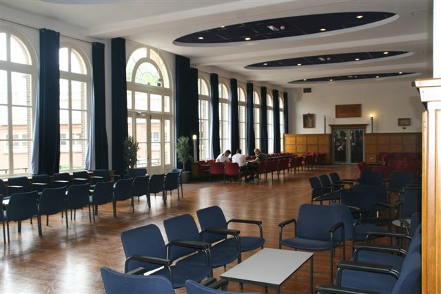 Zaaltje Korps Adelborsten